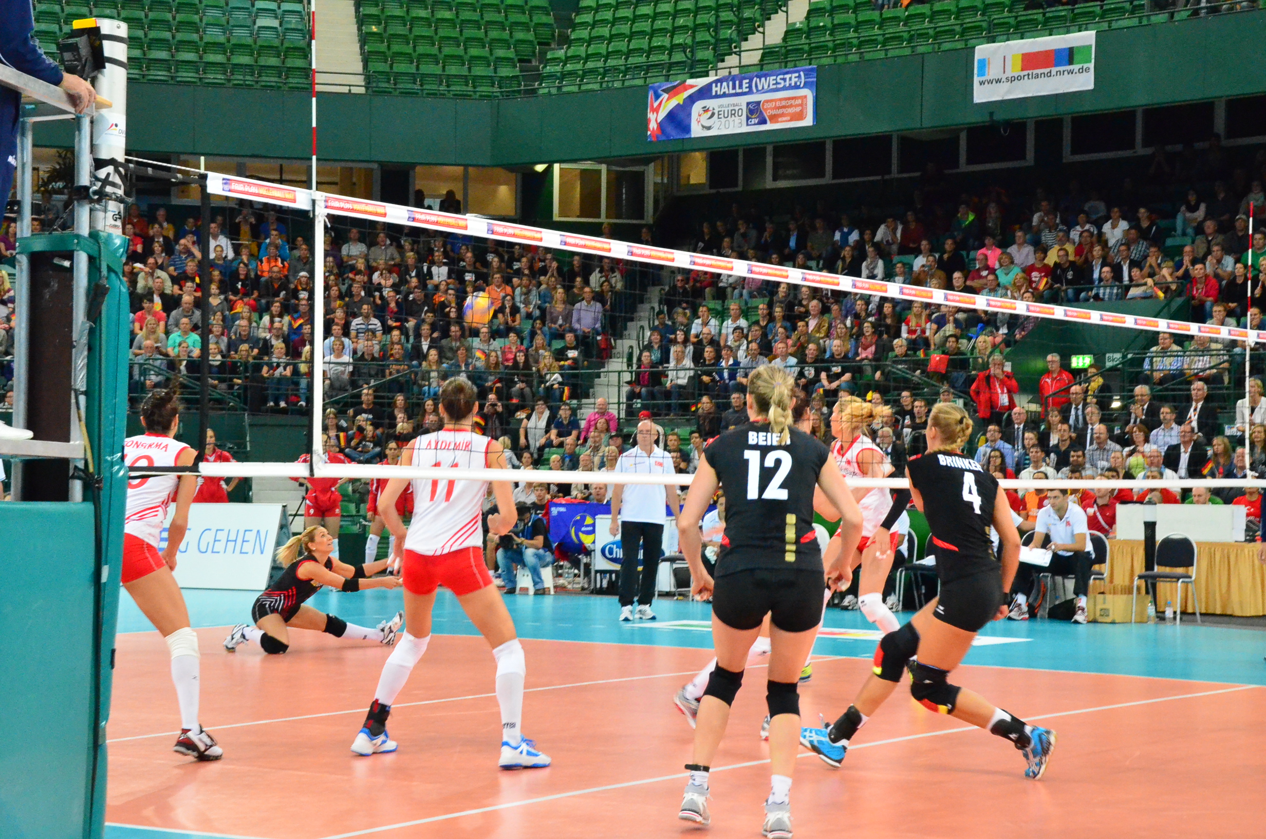 Volleyball-Europameisterschaft der Frauen 2013-Spielort Halle (Westf) Gerry-Weber-Stadion - Spiel 8. September 2013 (Deutschland-Türkei)